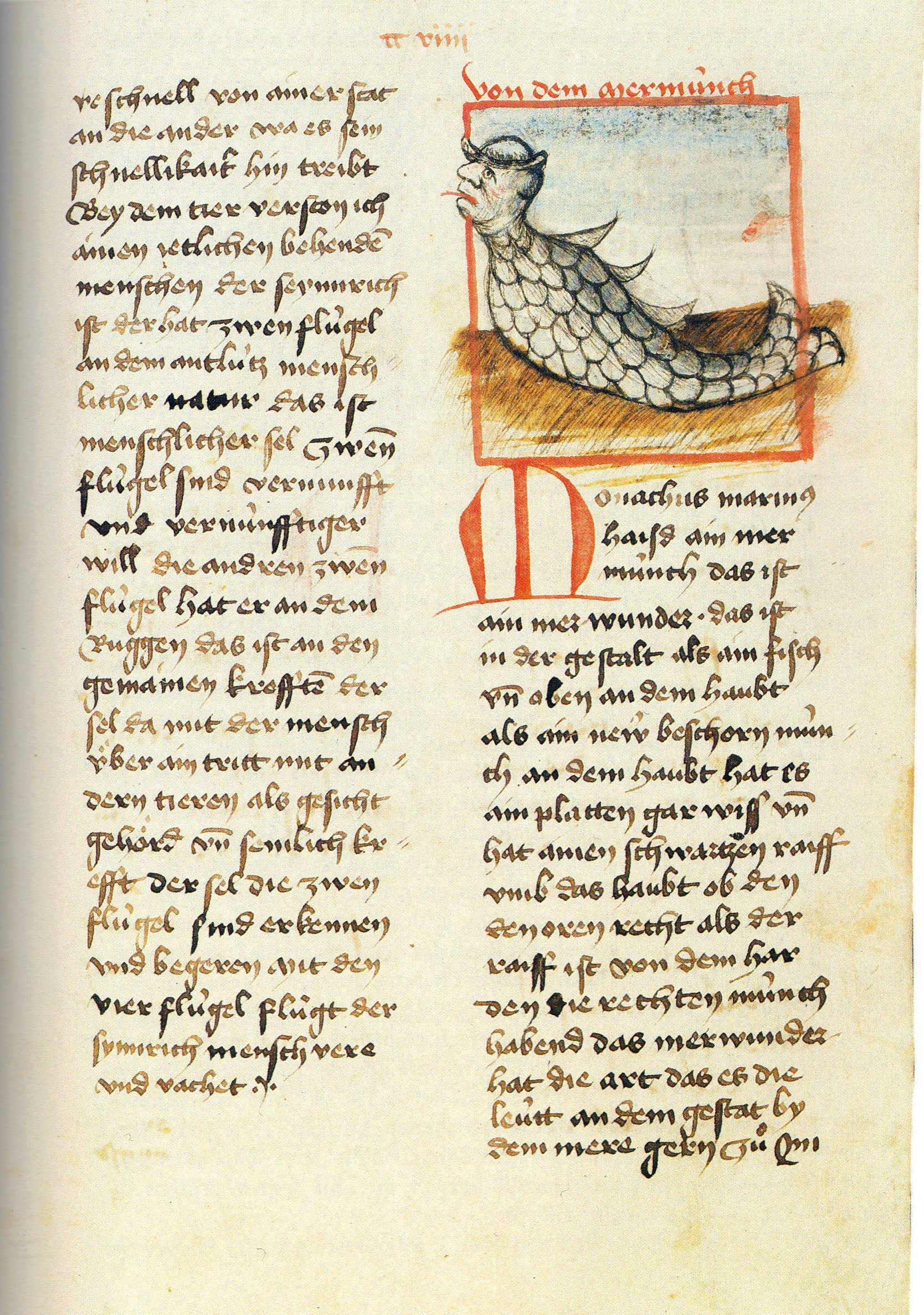 Konrad von Megenberg: Buch der Natur, Augsburg, Staats- und Stadtbibl., 2° Cod. 497, Bl. 209r